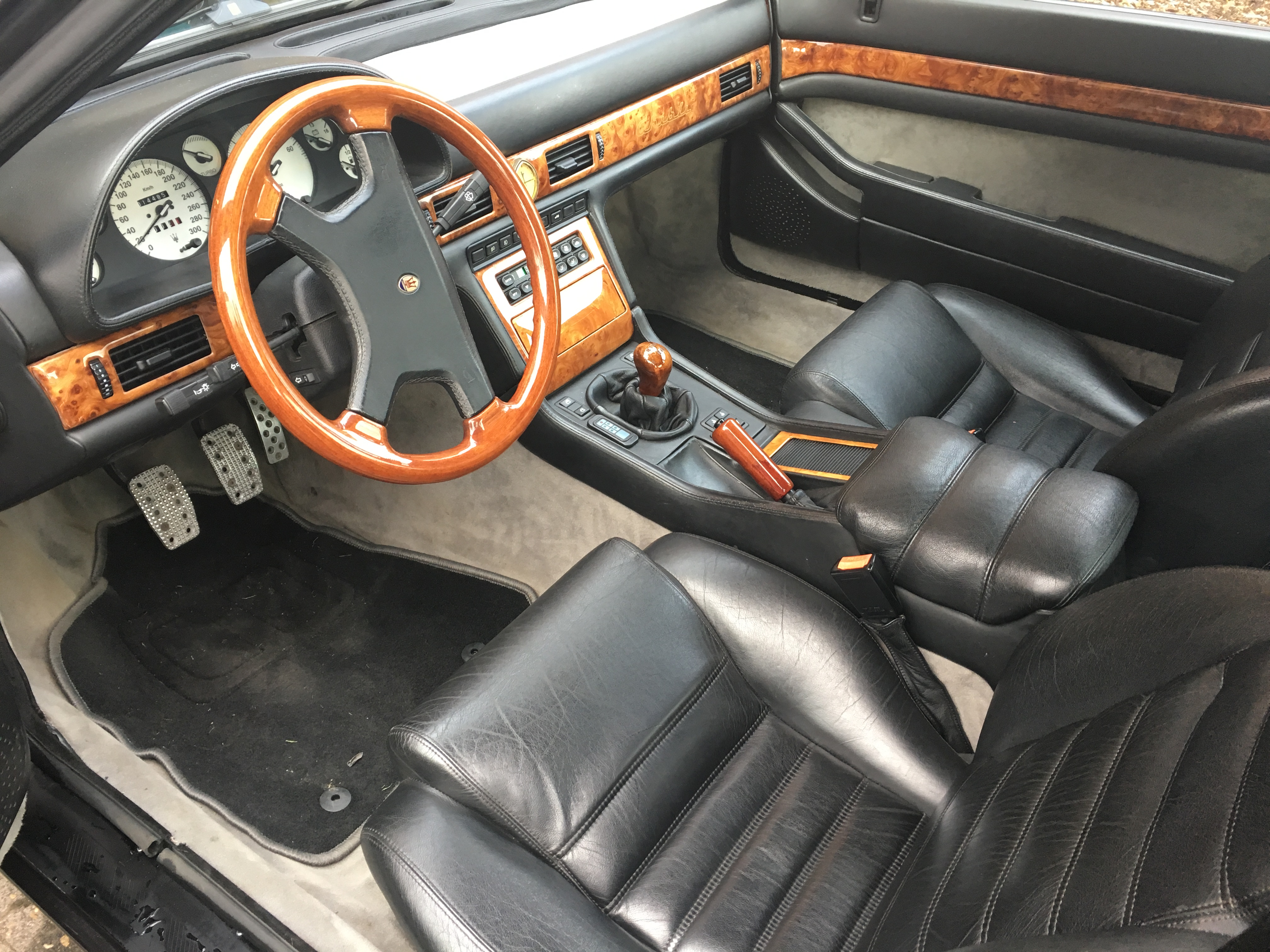 Innenraum Maserati Ghibli